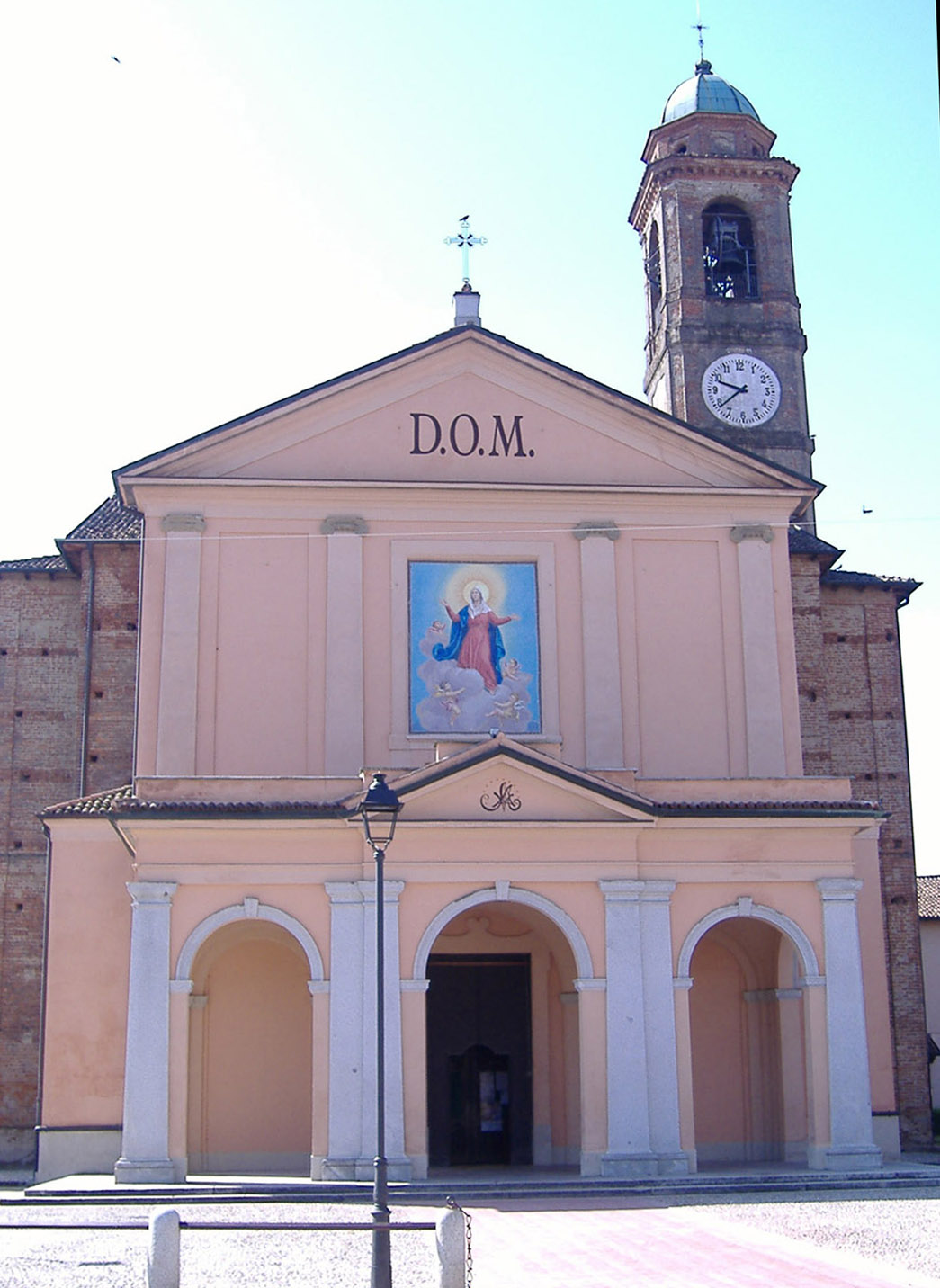 Lla chiesa parrocchiale dell'Assunzione della Beata Vergine Maria a Somaglia